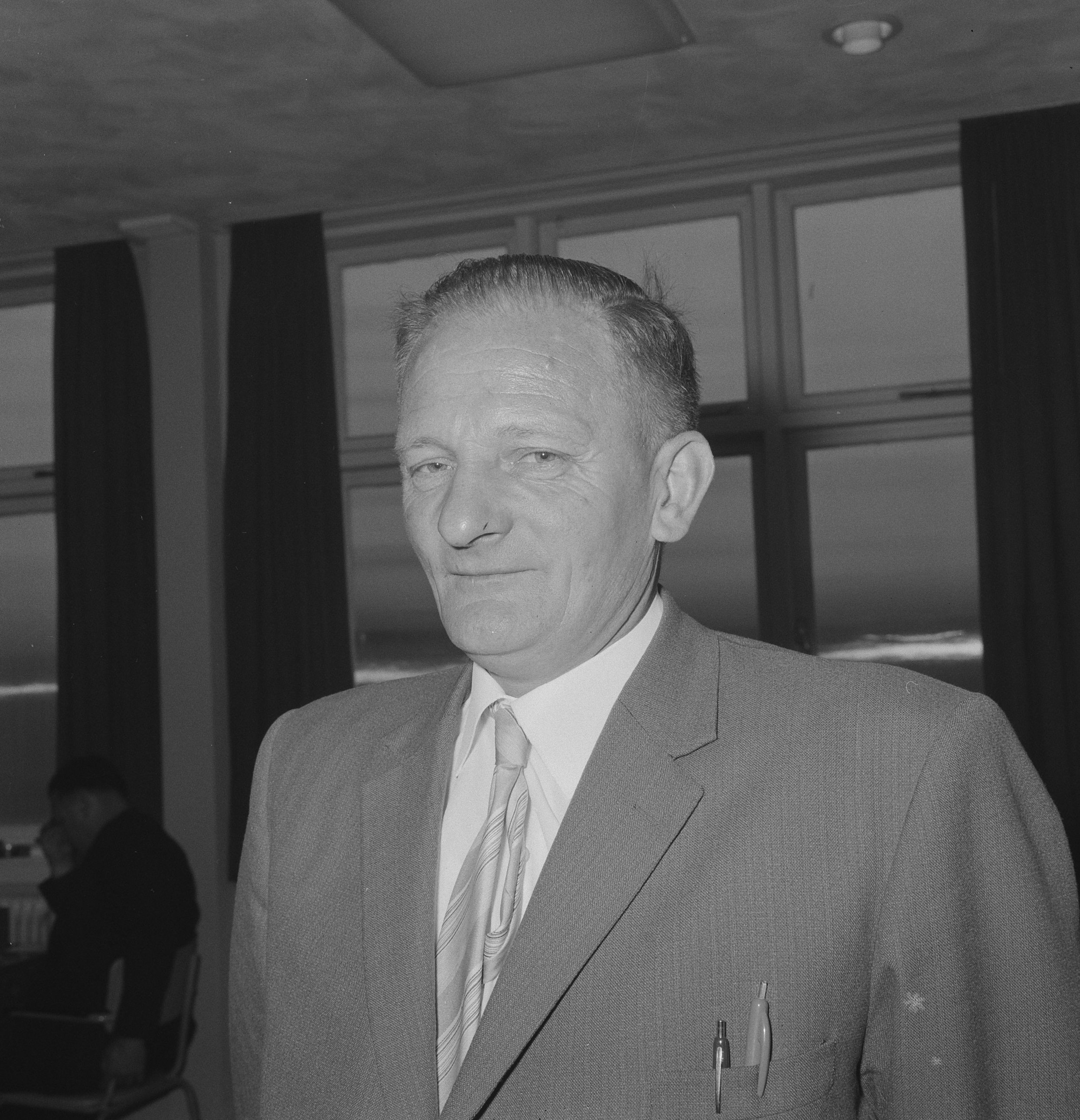 Collectie / Archief : Fotocollectie Anefo Reportage / Serie : [ onbekend ] Beschrijving : Kampioenschappen dammen in "De Kroon" , M. Boonstra (kop) (correctie: Menno Bandstra) Datum : 27 maart 1965 Trefwoorden : DAMMEN, KAMPIOENSCHAPPEN, KOPPEN Persoonsnaam : M. Boonstra Fotograaf : Nijs, Jac. de / Anefo Auteursrechthebbende : Nationaal Archief Materiaalsoort : Negatief (zwart/wit) Nummer archiefinventaris : bekijk toegang 2.24.01.03 Bestanddeelnummer : 917-5812